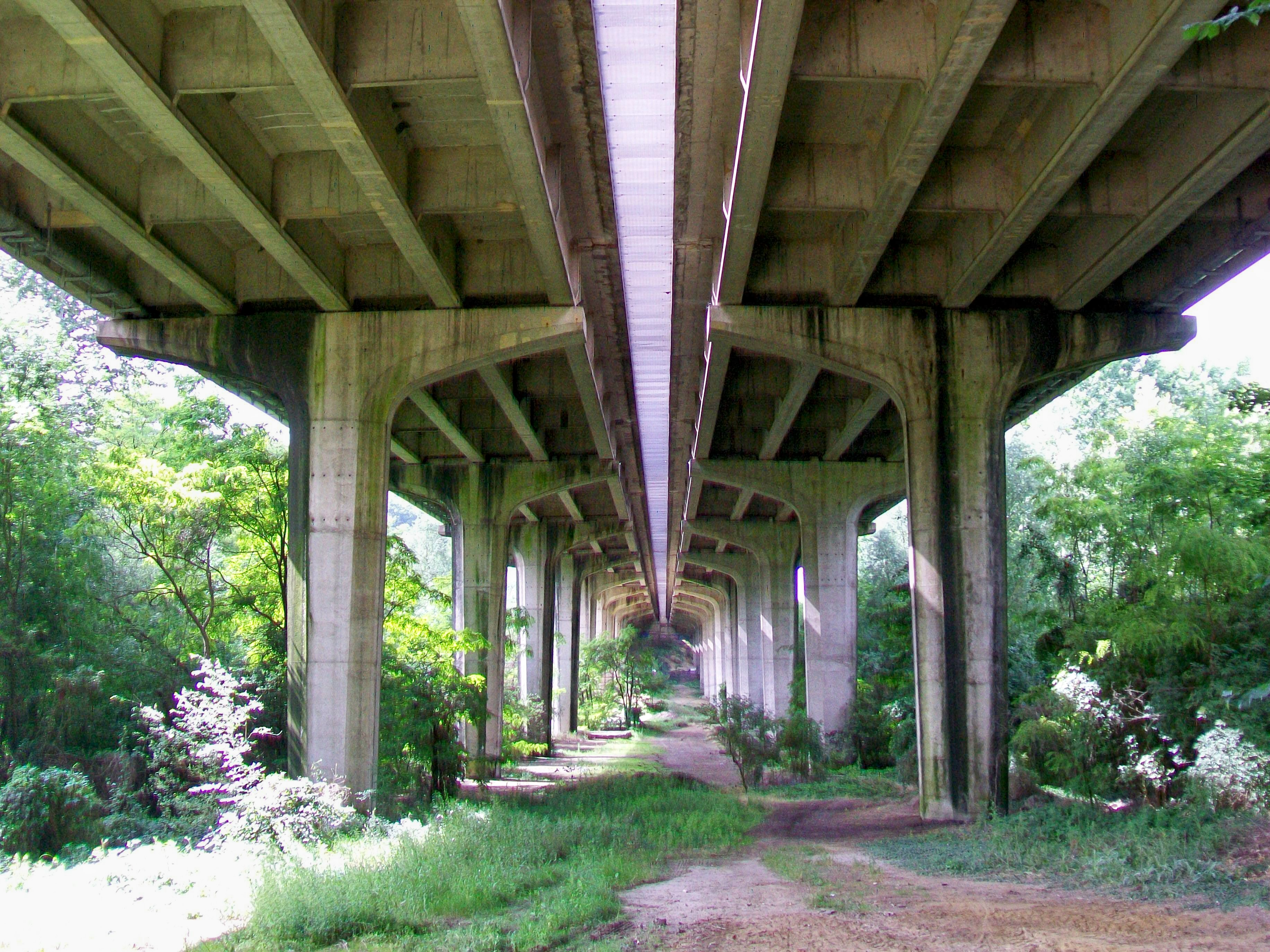 Roberval (60) : Le dessous du viaduc de l'autoroute A1, vu depuis le chemin de Fosse.